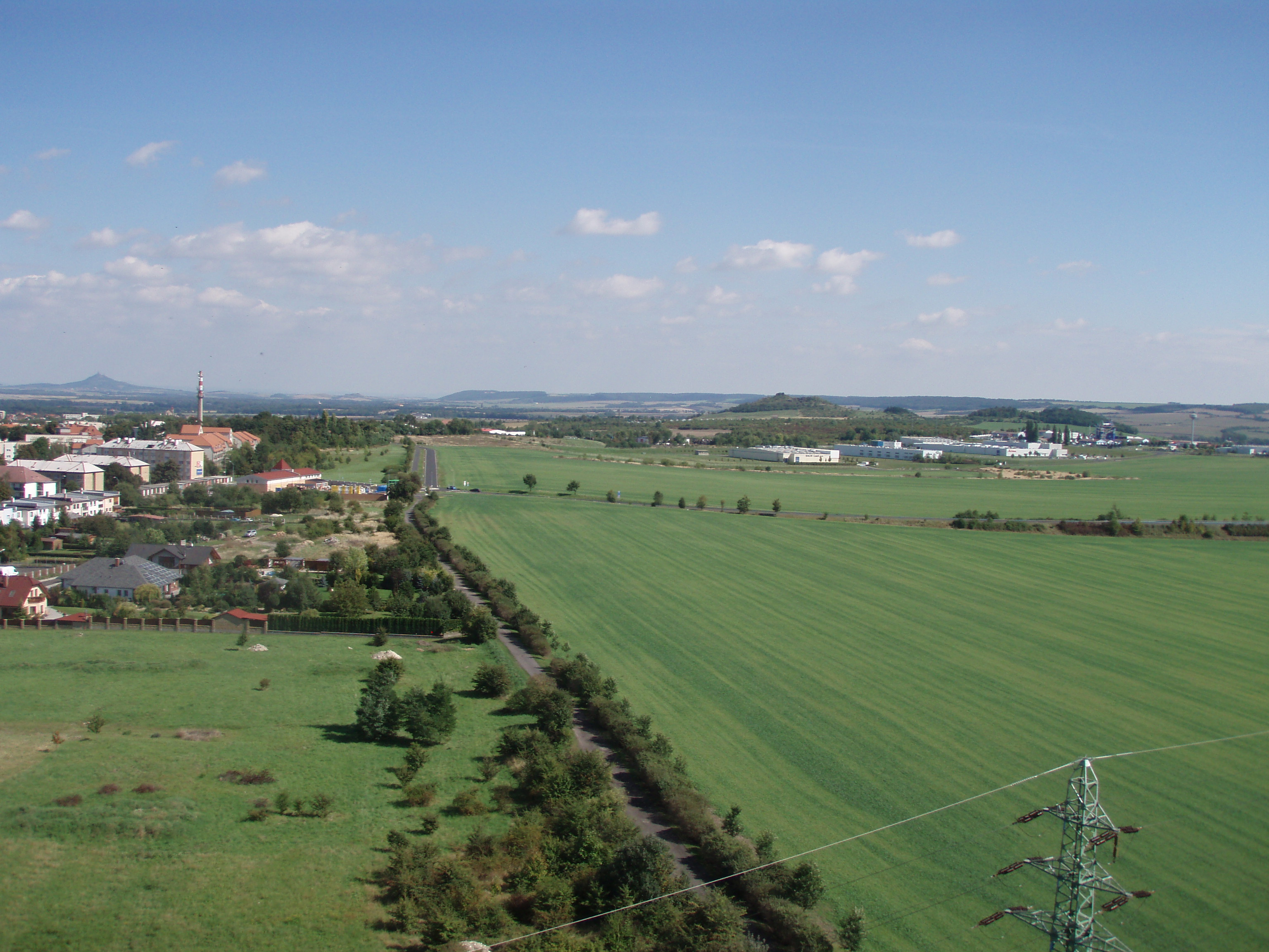 Pohled z vodárenské věže na východoseverovýchod. Vlevo Louny s Hazmburkem v pozadí, vpravo průmyslová zóna Louny - jihovýchod, v pozadí Blšanský chlum.